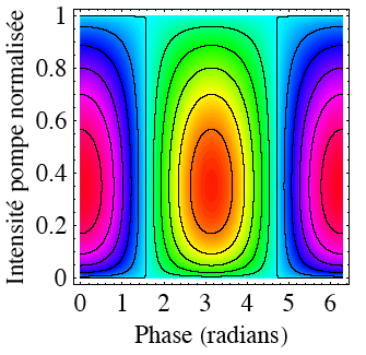 Evolution de la phase non-linéaire en fonction de l'intensité de pompe pour un accord de phase parfait. Source: Nicolas Forget, avec son autorisation. Licensing Catégorie:Schéma de physique